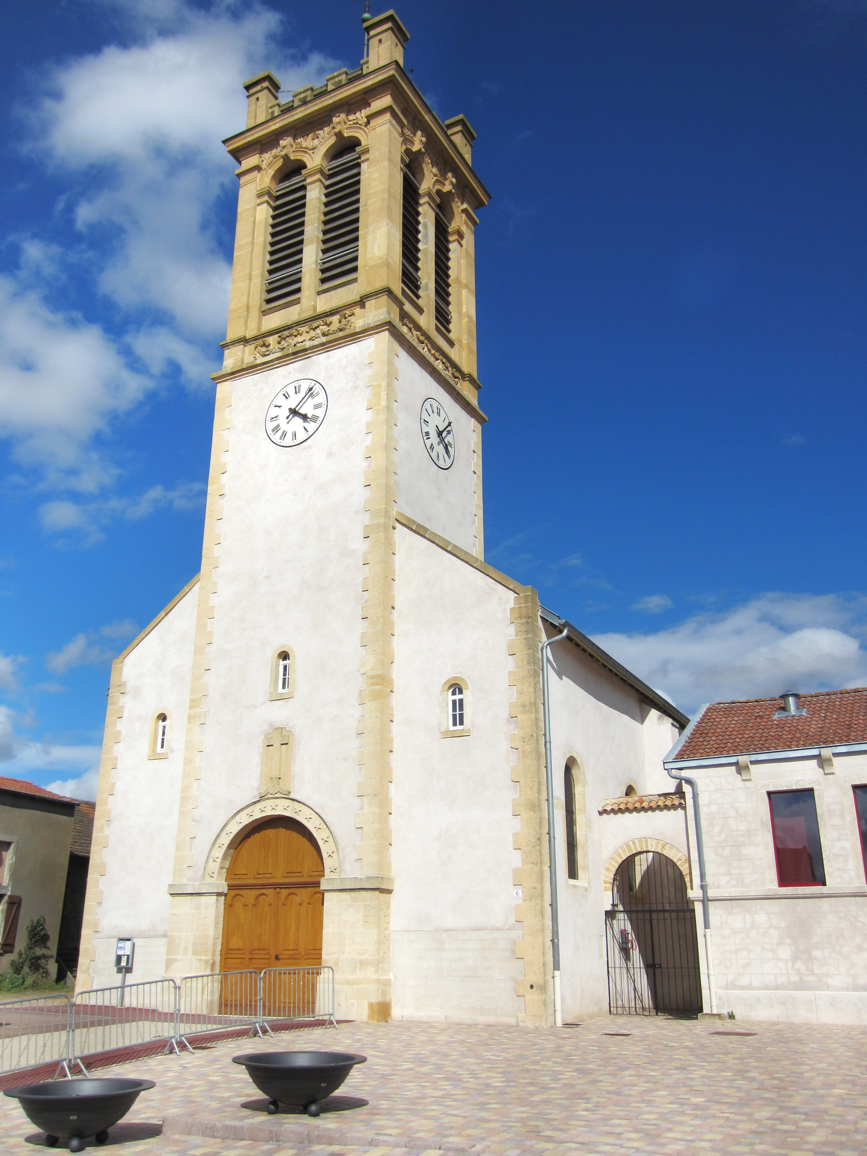 Description eglise Mars la Tour eglise Mars la Tour